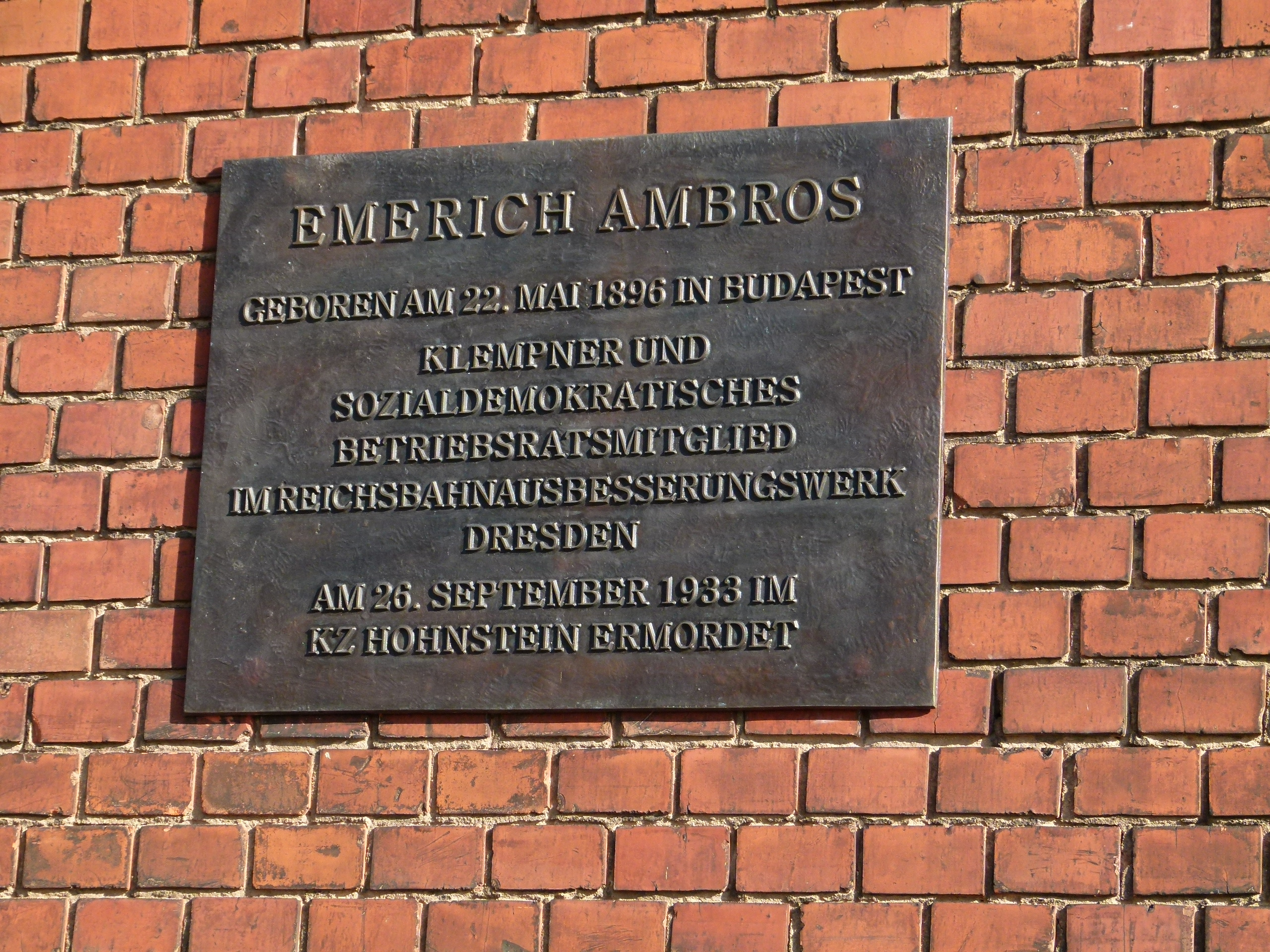 Gedenktafel für Emerich Ambros, Emerich-Ambros-Ufer 50, Friedrichstadt, Dresden